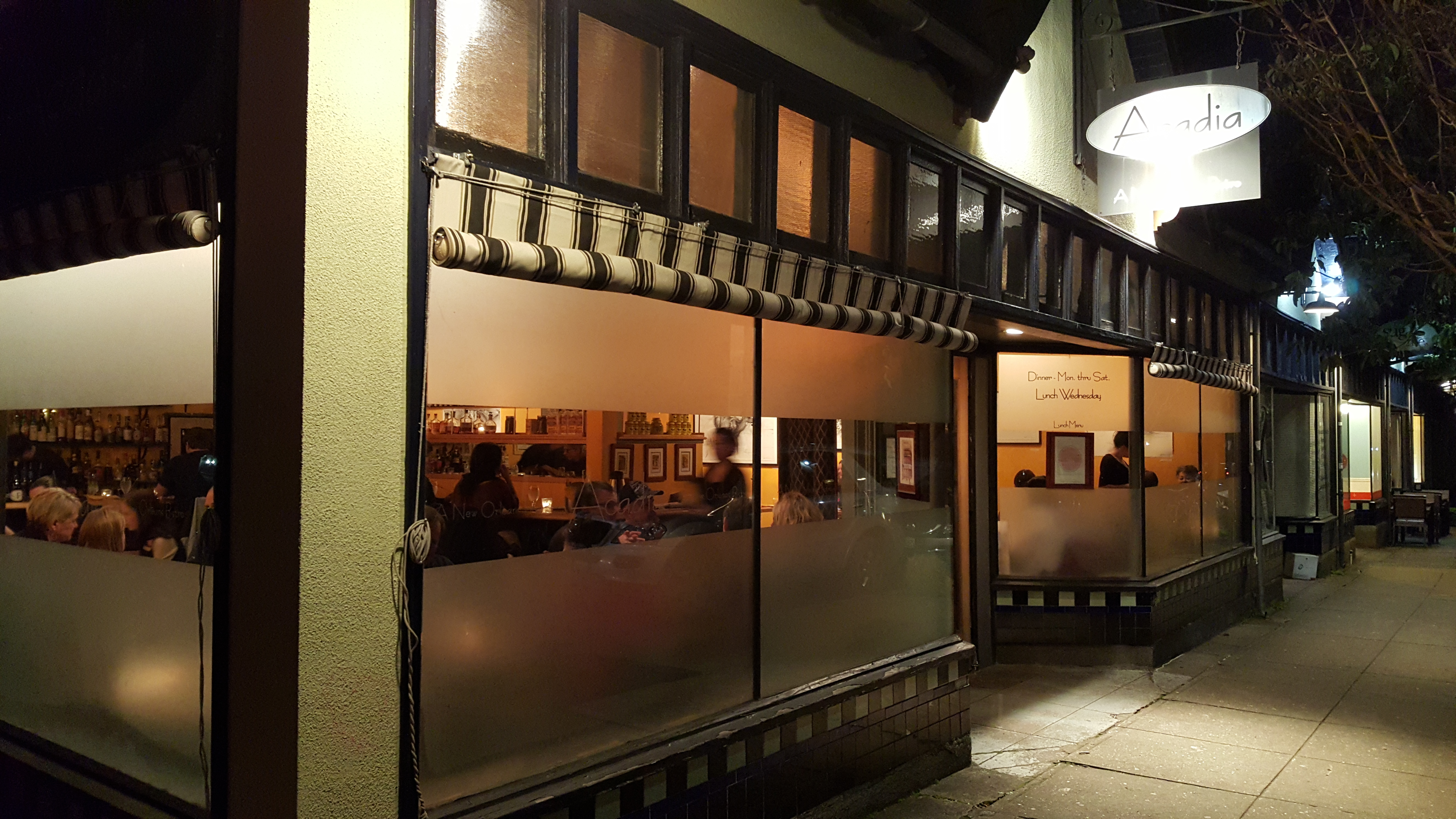 Acadia restaurant, Portland, Oregon